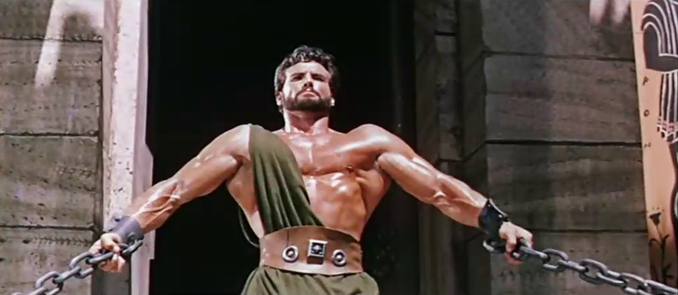 Scena del film Le fatiche di Ercole (1958)